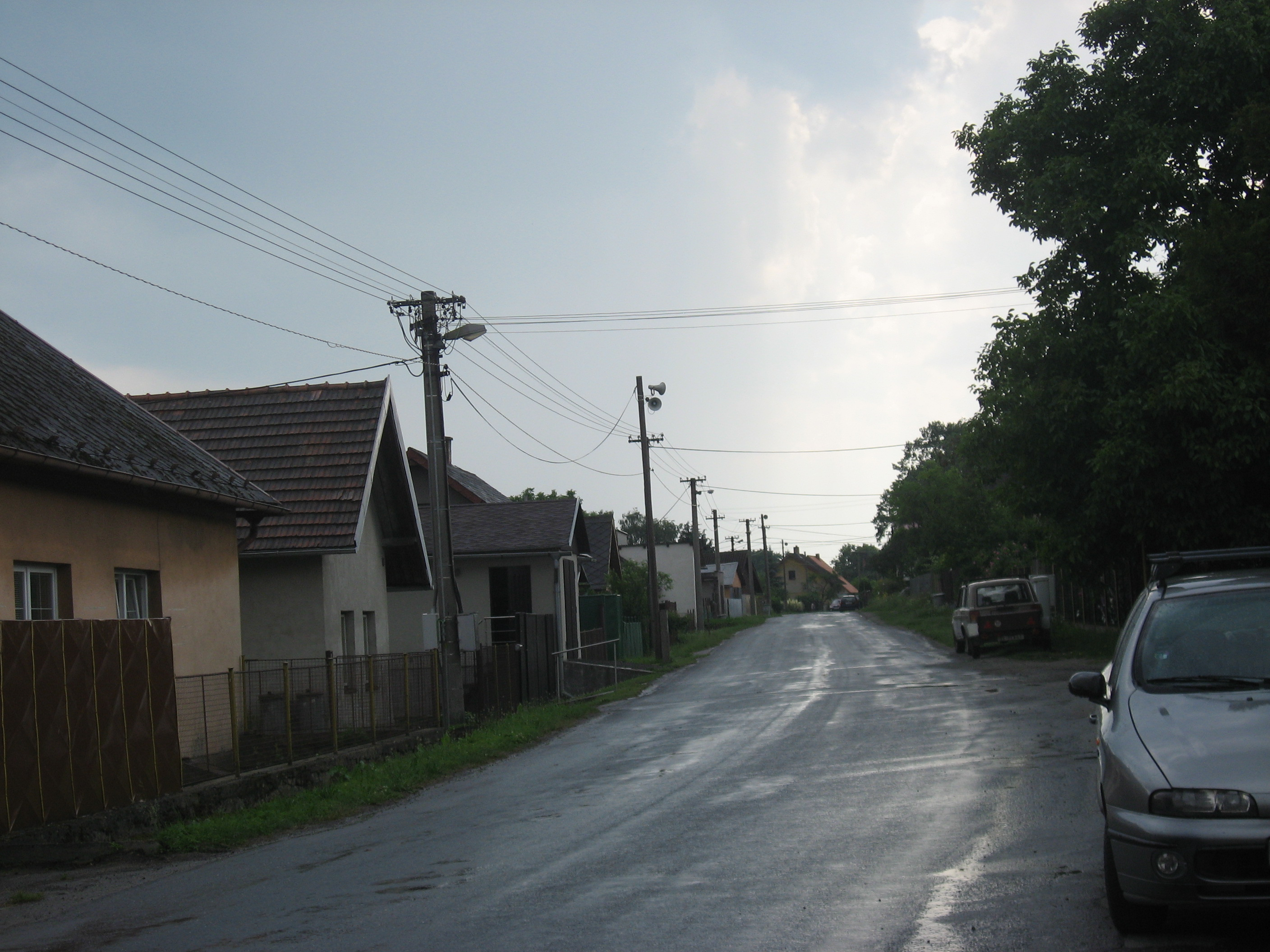 Hněvkovice